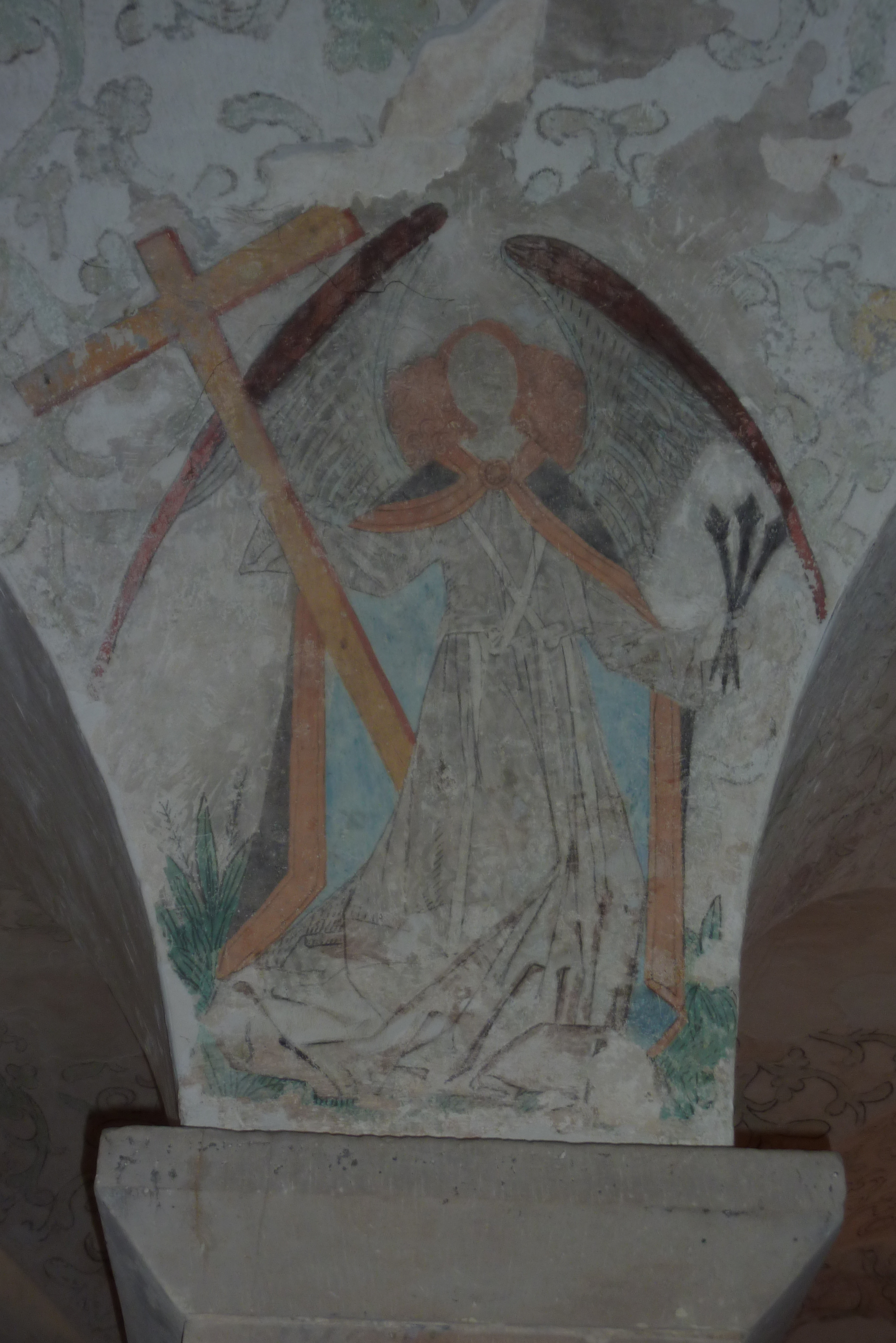 Crypte Grote of Lebuïnuskerk Deventer